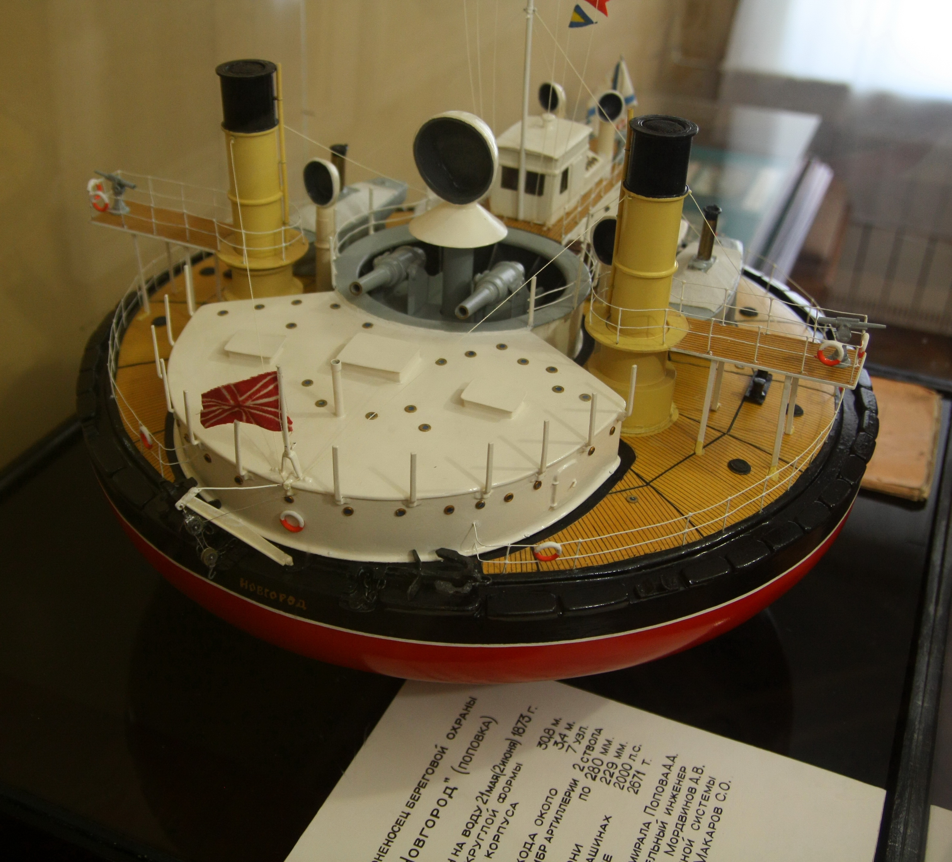 Макет броненосця берегової охорони в Музеї суднобудування та флота у Миколаєві